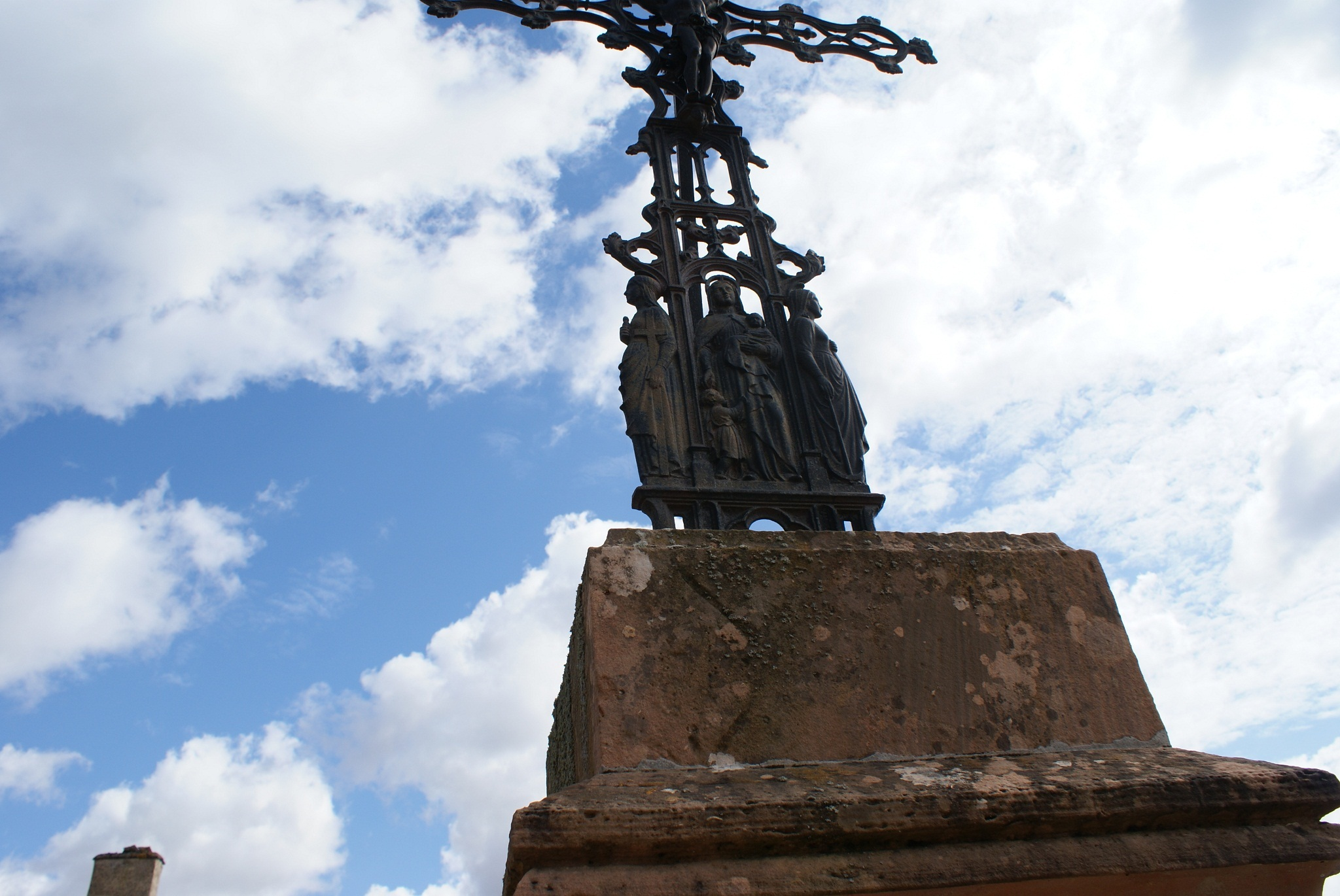 Gietijzeren kruis in Monties.